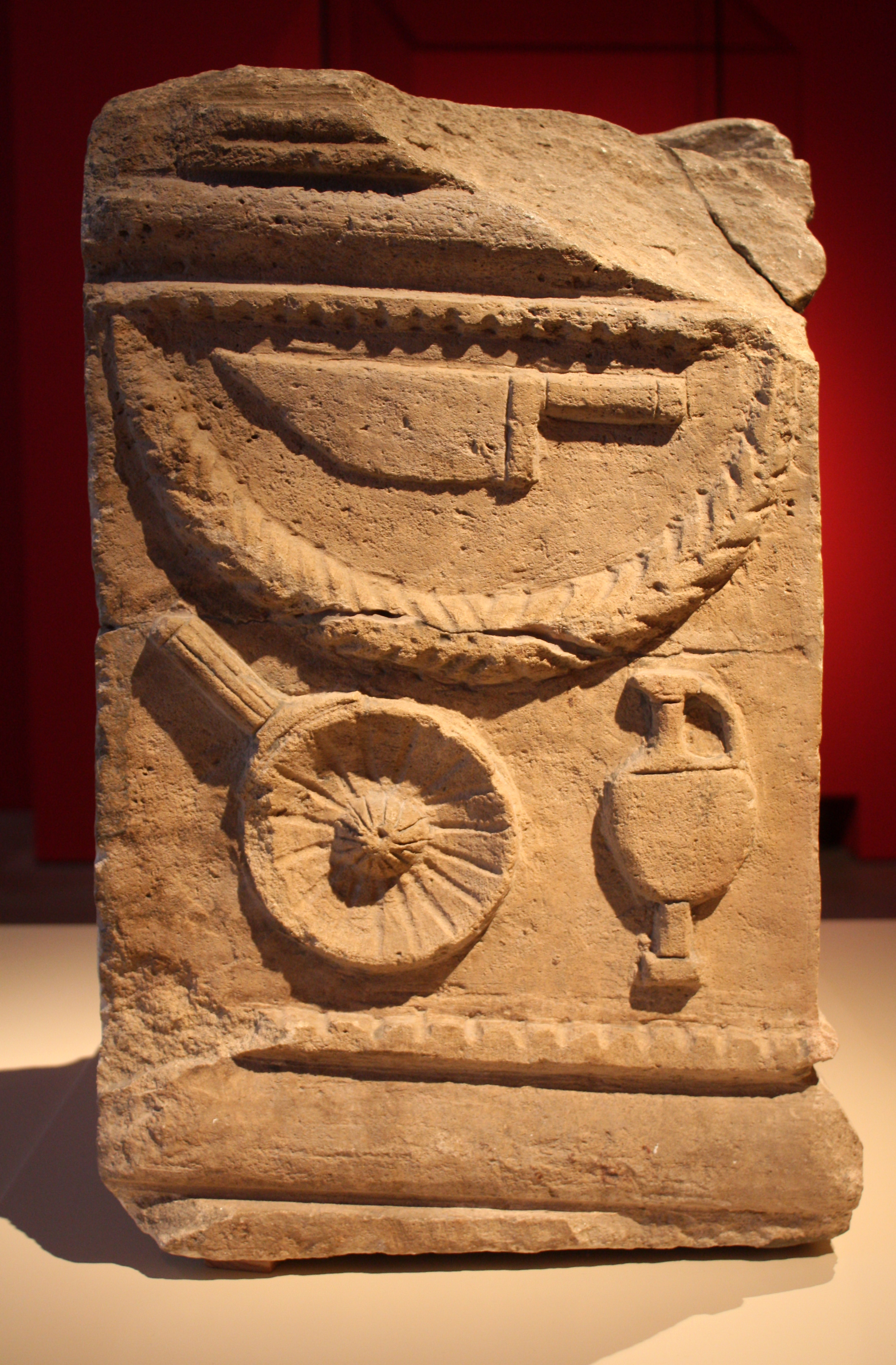 Epigraphische Datenbank Heidelberg HD052838. F007051 F017224 F017222 F017223 Kastell Koblenz Niederberg, Altarstein mit der Abbildung von Opfergaben; AE 1903, 00089. Der Stein wurde von Cnaeus Calpurnius Verus – dem Präfekten der Kohorte − der Göttin Fortuna geweiht. Kalkstein, 1. Hälfte des 3. Jahrhunderts. Begleittext (Auszug): FORTVNAE CN(aeus) CALPVRNIVS VERVS PRAF(ectus) COH(ortis) VII RAETOR(um) EQ(uitatae) Ort der Ausstellung: Rheinisches Landesmuseum Bonn